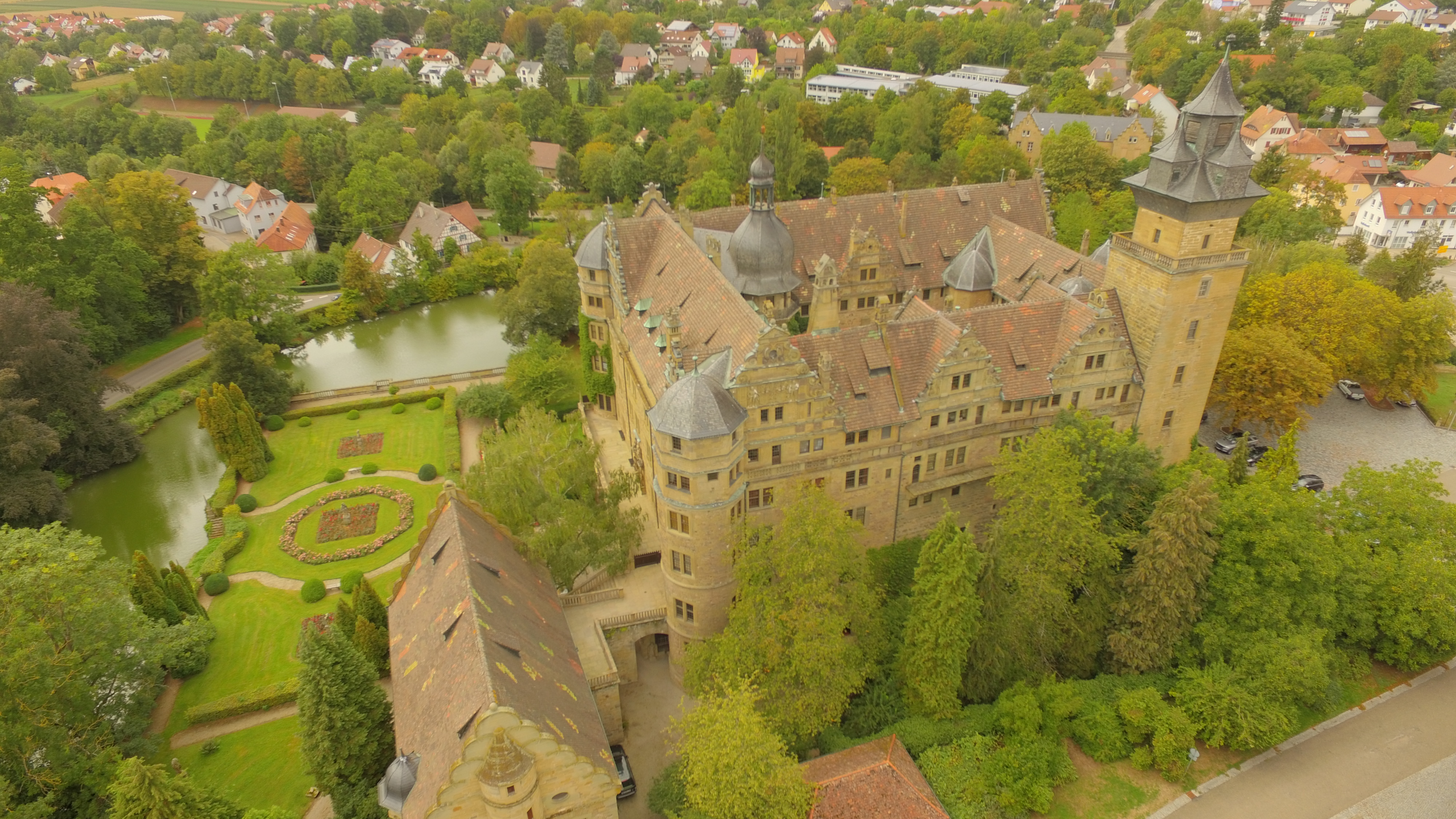 Schloss Neuenstein aus Südwest